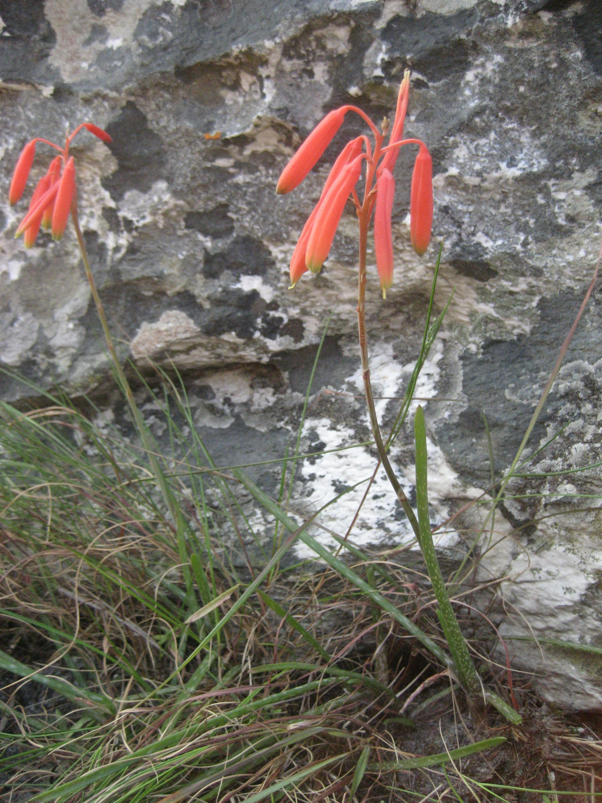 Aloe wildii - Gudza 1